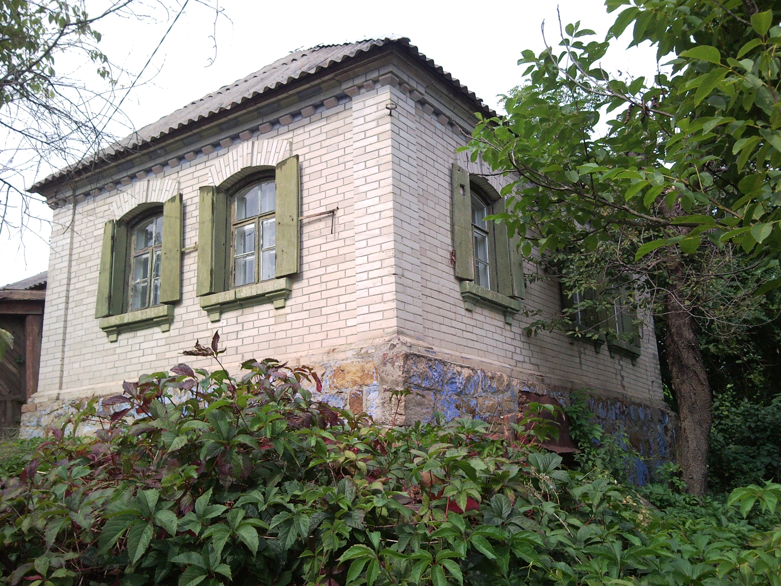 Борсків Будинок старовірів